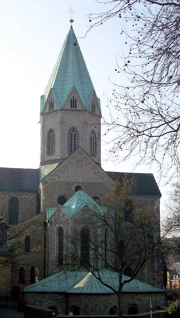 Essen Kloster Werden Dom Totale